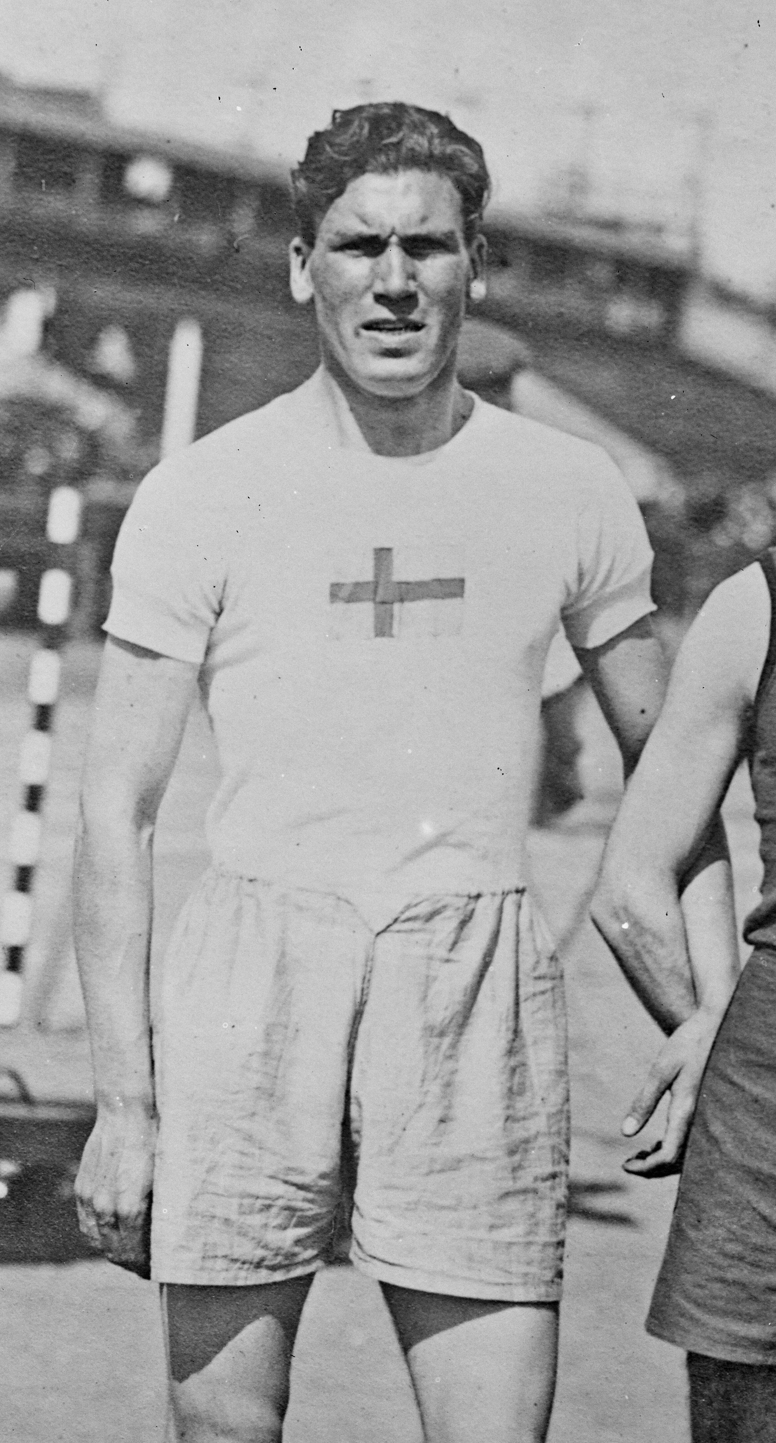 Sundblad [les deux premiers du 400 m du meeting international de Prague], Prague, jeux Massaryck [Masaryk] Heyck : [photographie de presse] / [Agence Rol]